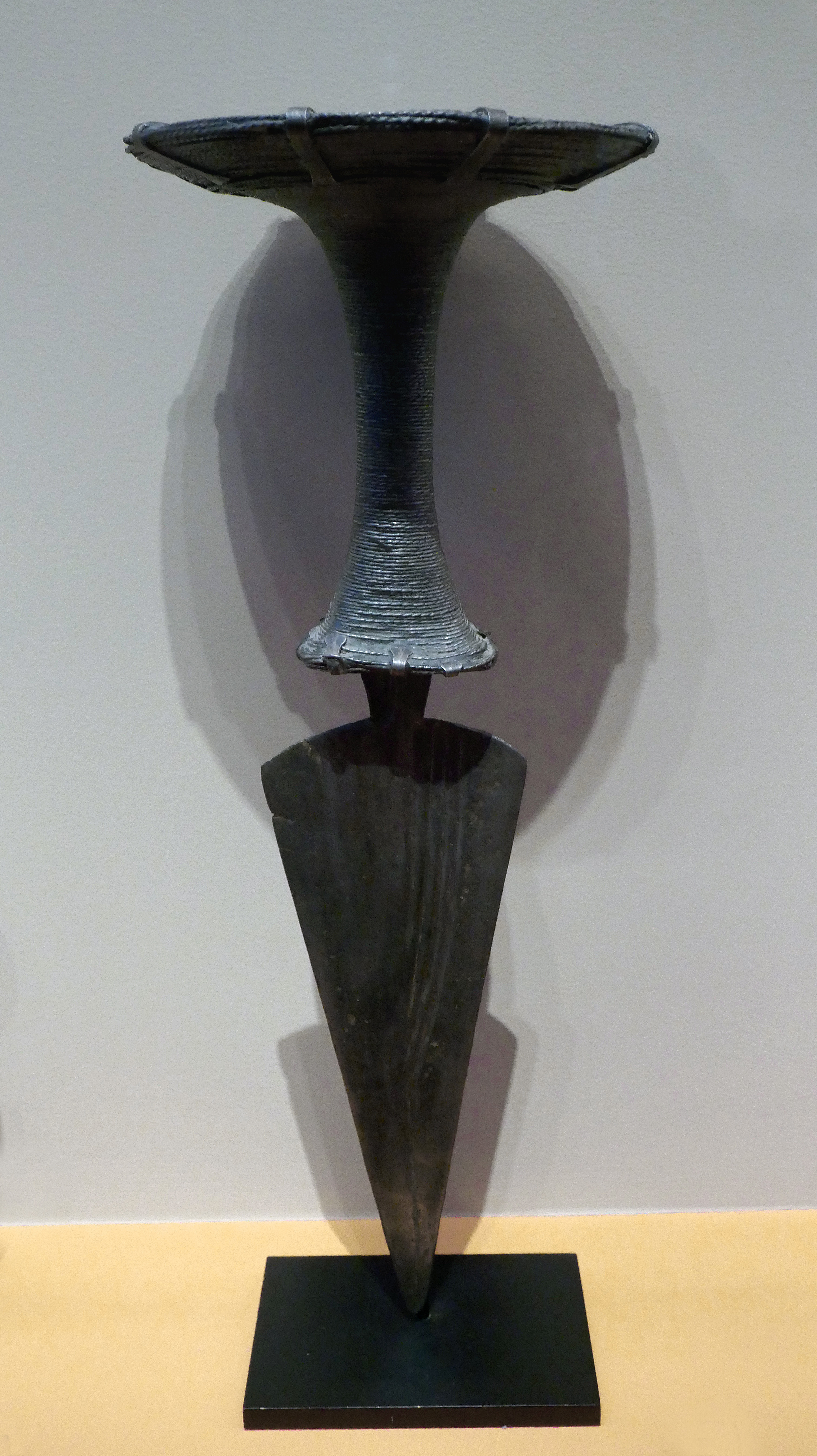 Couteau Population Adio ou Makaraka Soudan Fin du 19e siècle Fer, bois Collection privée Objet présenté lors de l'exposition Frapper le fer. L'art des forgerons africains au musée du quai Branly Jacques Chirac.